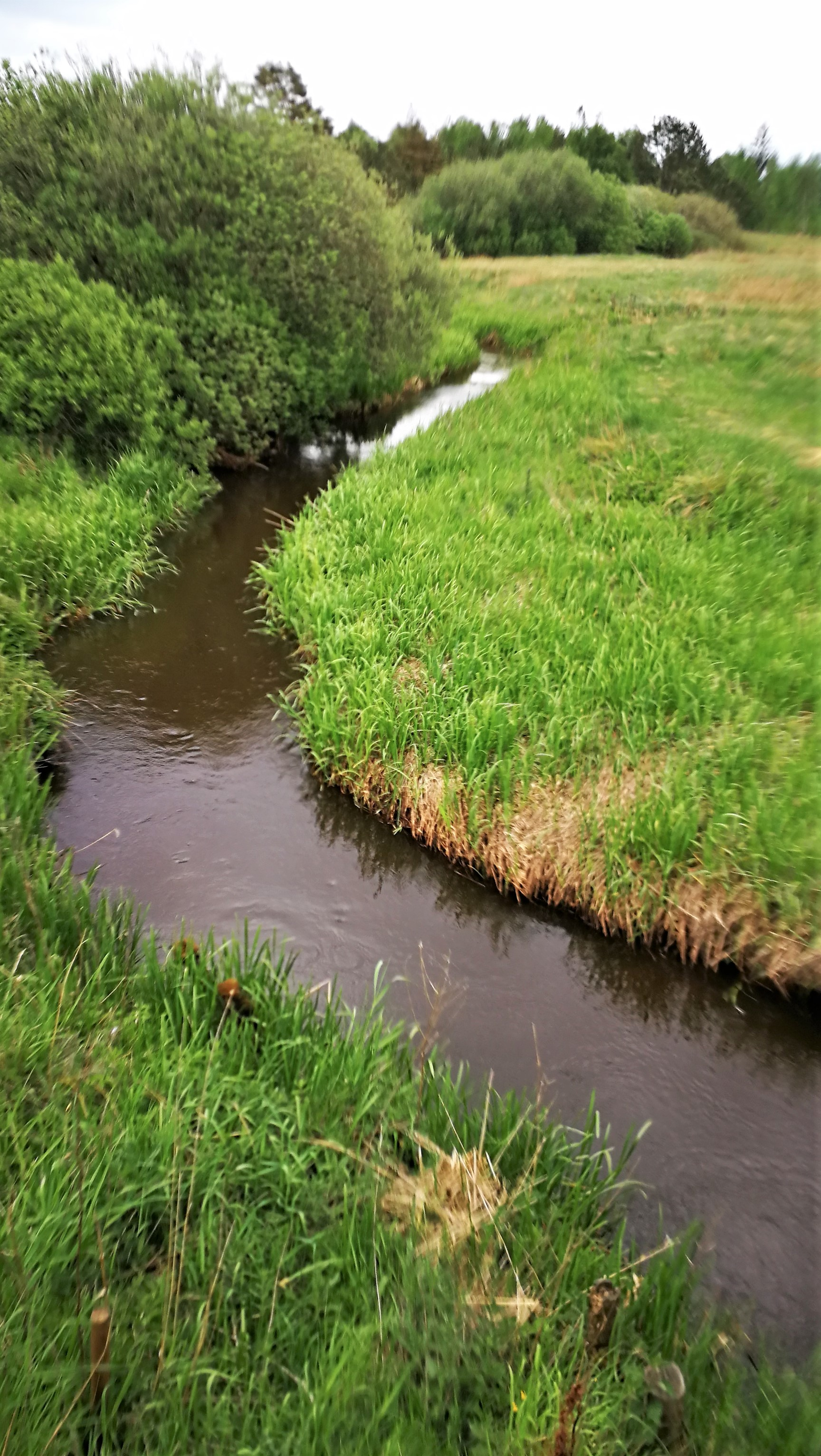 Skygge Å set mod vest, vest for A 13